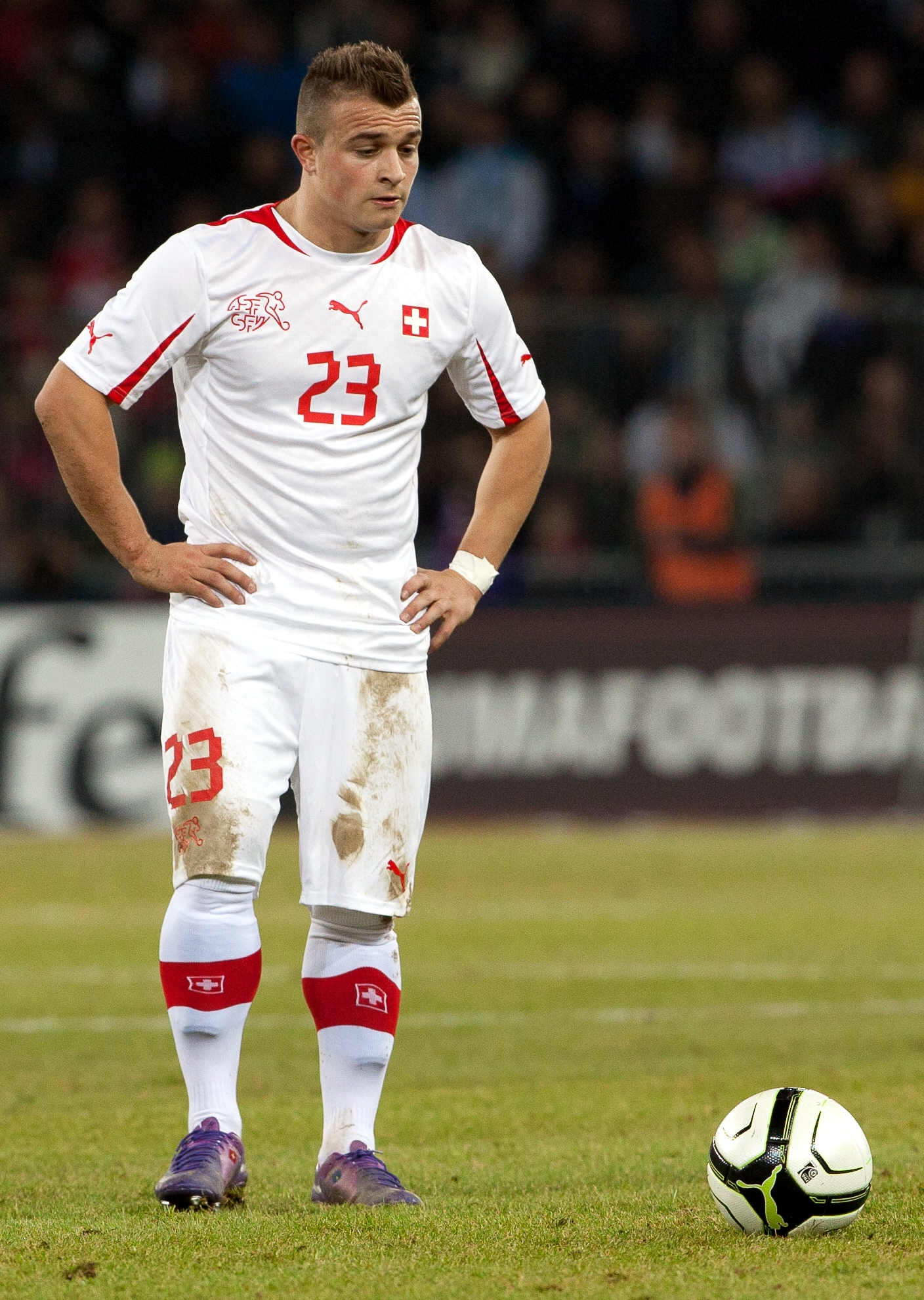 Xherdan Shaqiri